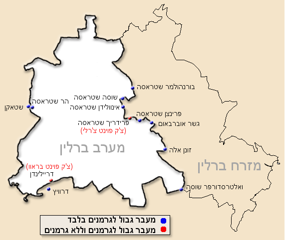 Berlin Wall Map